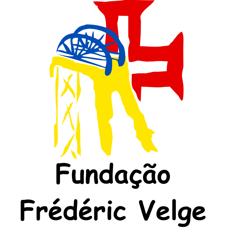 Logotipo da Fundação Frédéric Velge